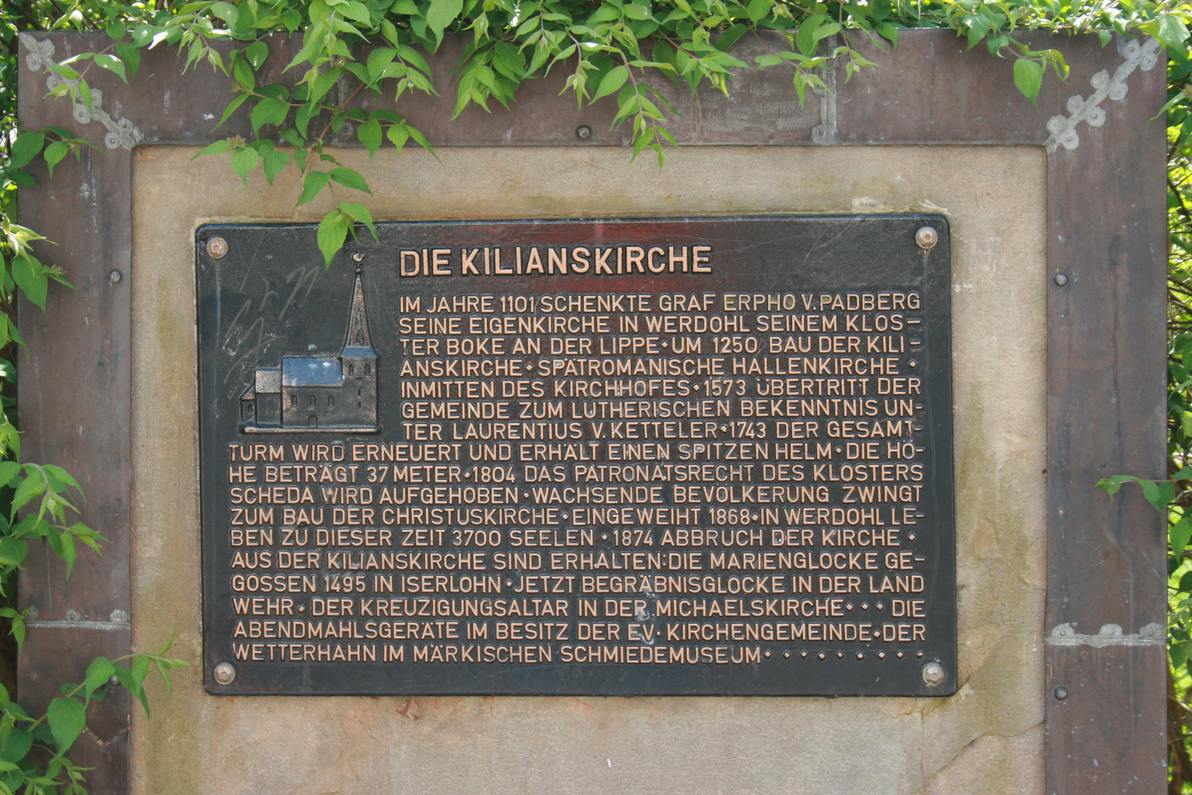 Ehemalige Kilianskirche auf dem Friedrich-Keßler-Platz in Werdohl